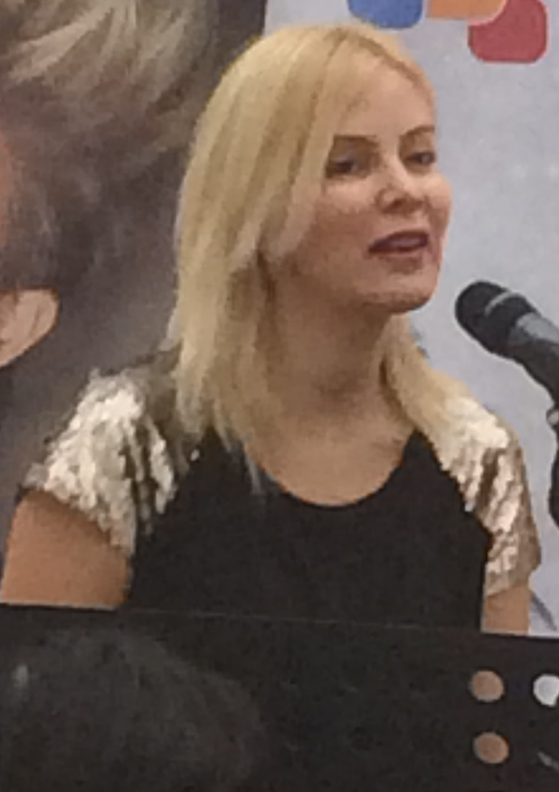 Omur Gedik